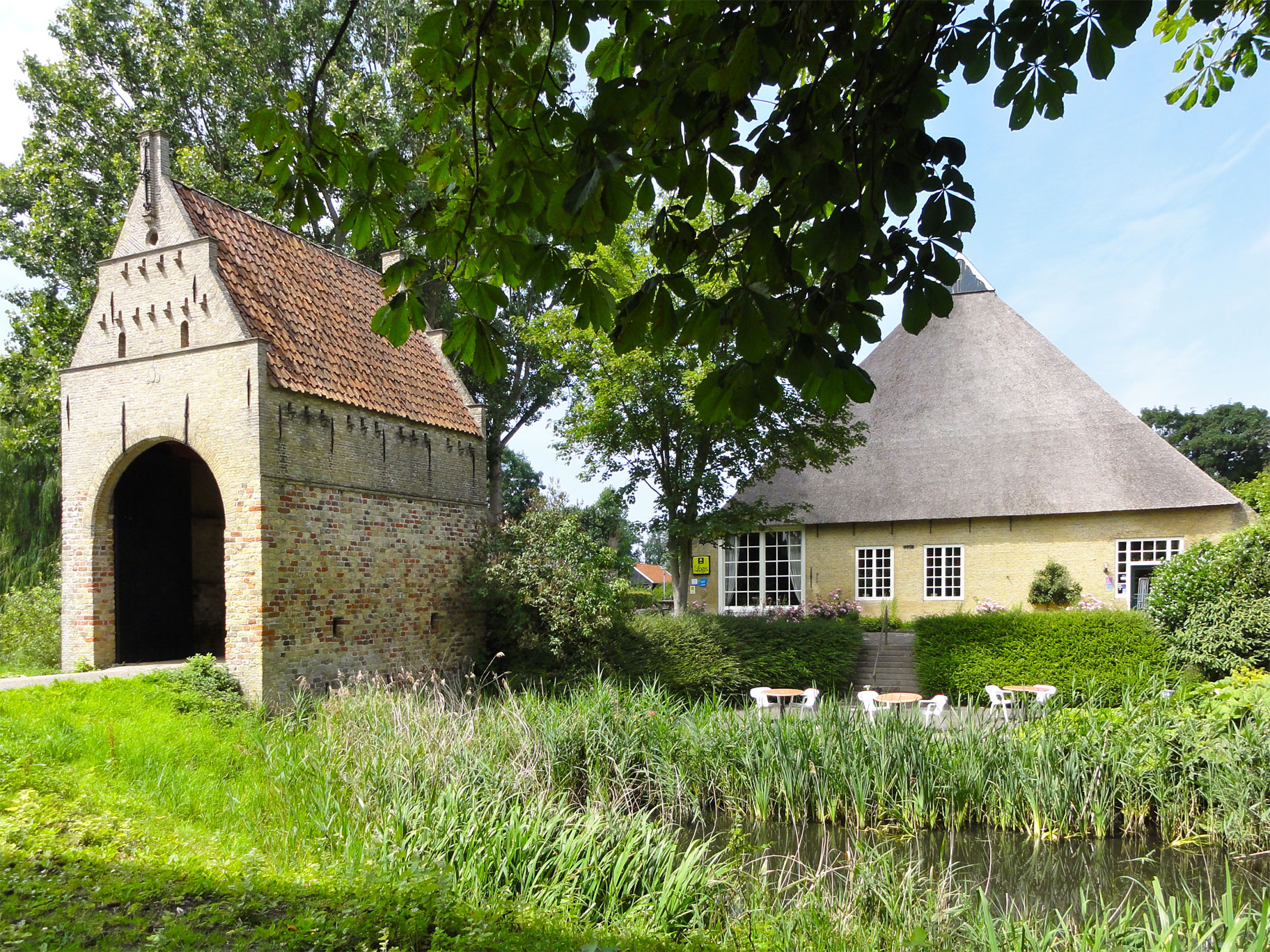 Poortgebouw Liauckemastate + kop-hals-rompboerderij in gele Friese stee op terrein voormalige Liauckemastate